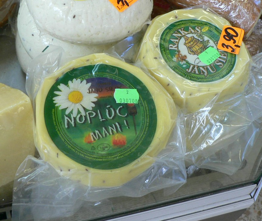 Tradycyjne sery świętojańskie (jāņu siers) wystawione na rynku w Rydze